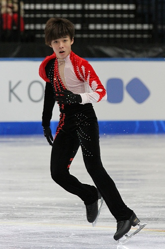 Chin-I Tsao (Тайвань) на чемпионате мира по фигурному катанию среди юниров 2012